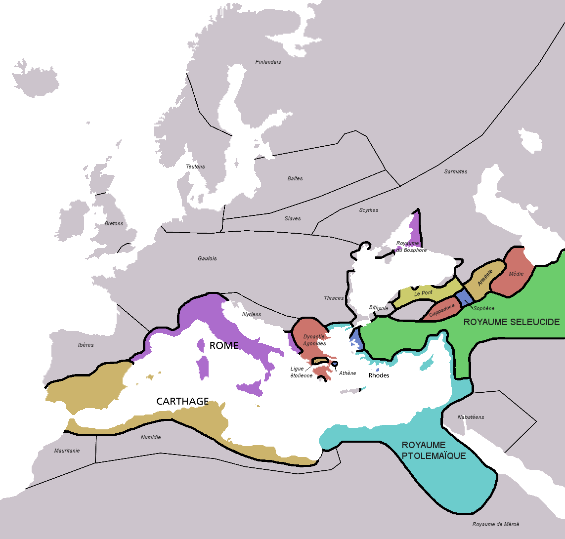 Carte d'Europe, en 220 av. J.C